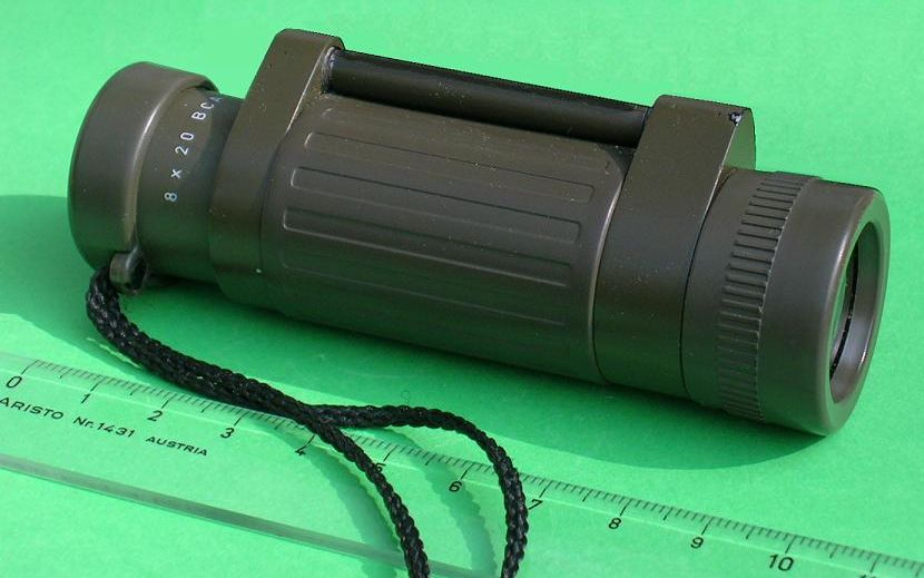 Trinovid-Fernglas 8x20, rechteHälfte (Monokular).